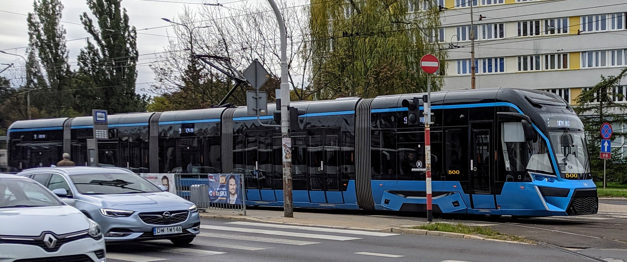 Tramwaj linii 9 nr 500, typ Moderus Gamma, ruszający z przystanku przy ul. Ślężnej we Wrocławiu w kierunku Sępolna